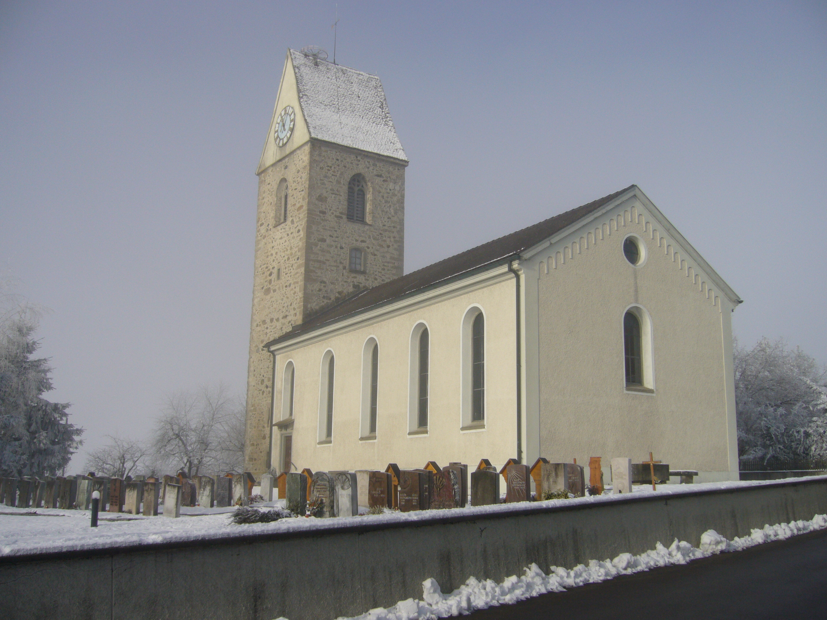 Kirche und Friedhof zu Lustdorf.